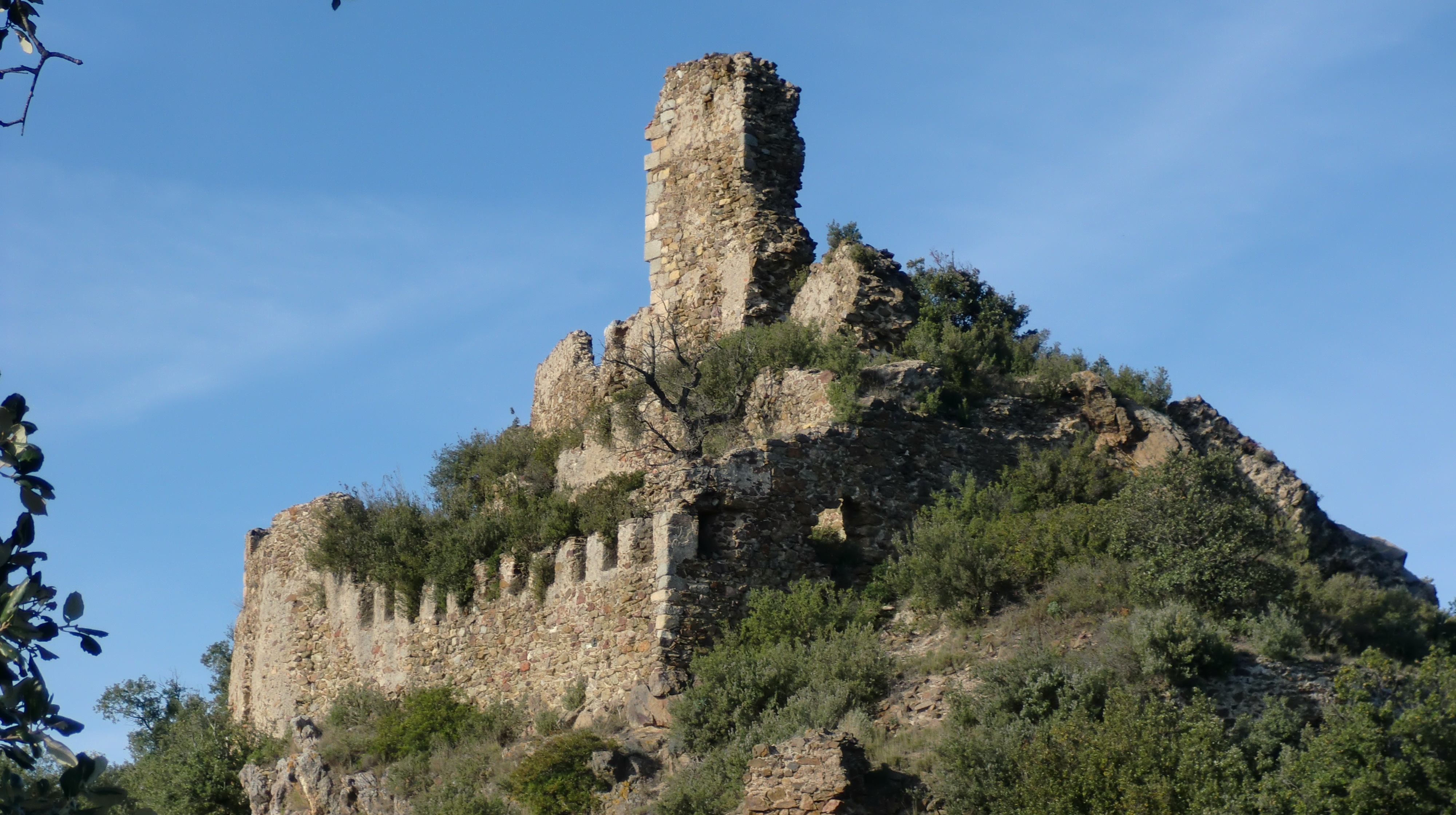 Castell de Mont-roig (Darnius)